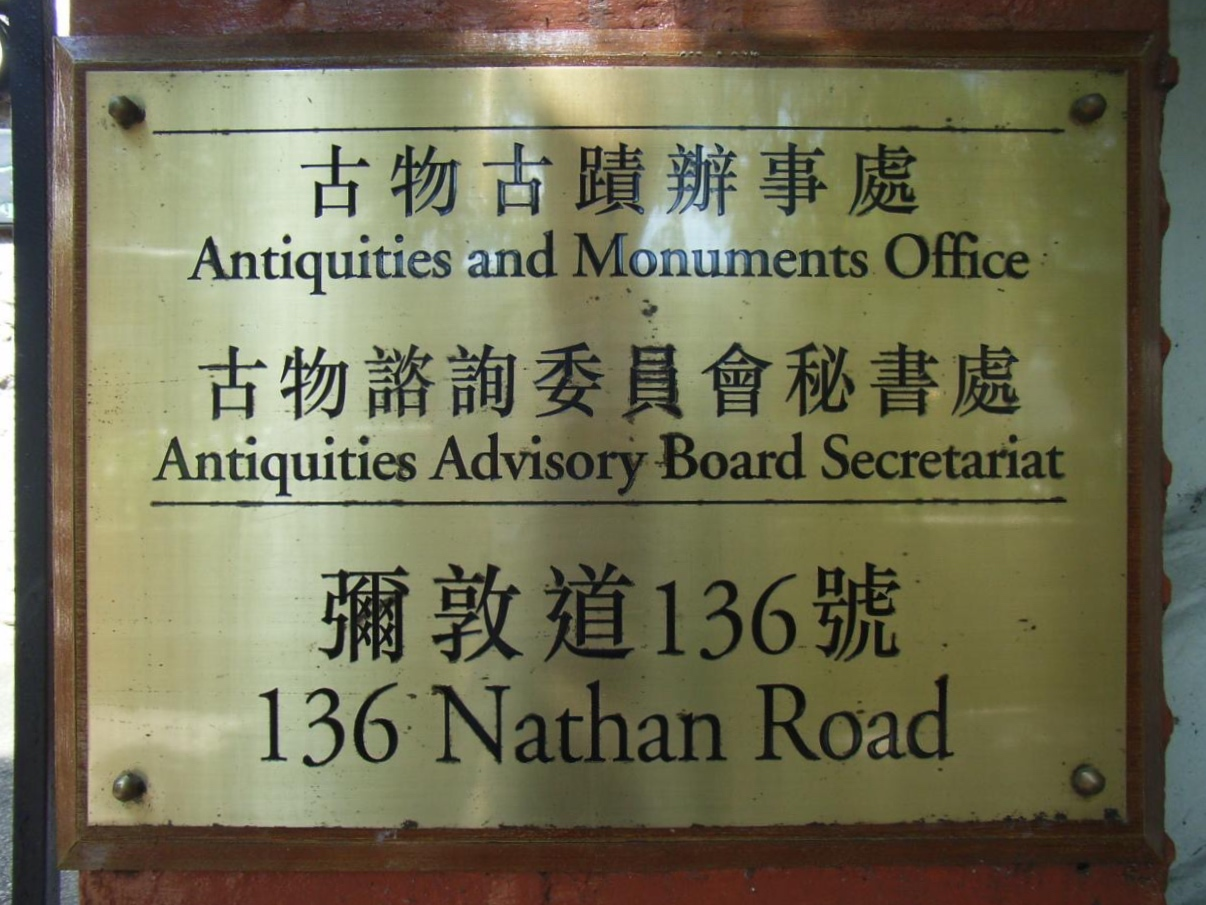 中文（香港）: 古物古蹟辦事處、古物諮詢委員會秘書處，地址：香港九龍尖沙咀彌敦道136號。